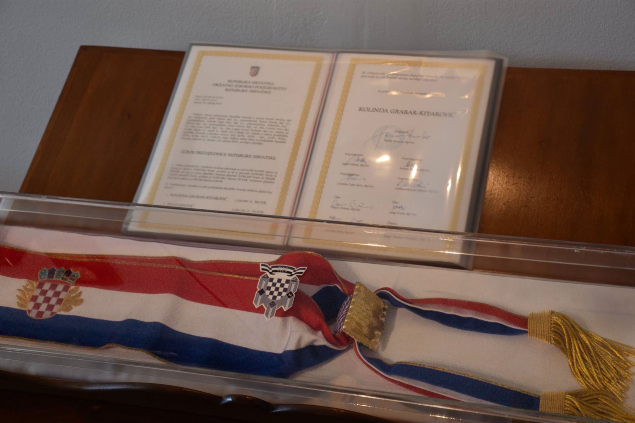 Predsjednička lenta Republike Hrvatske